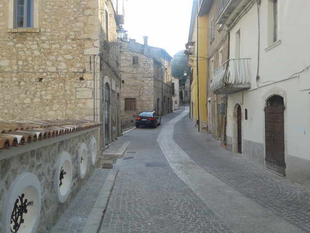 Scorcio fotografico di Pescina